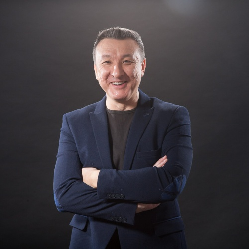 лидер-вокалист, гитара